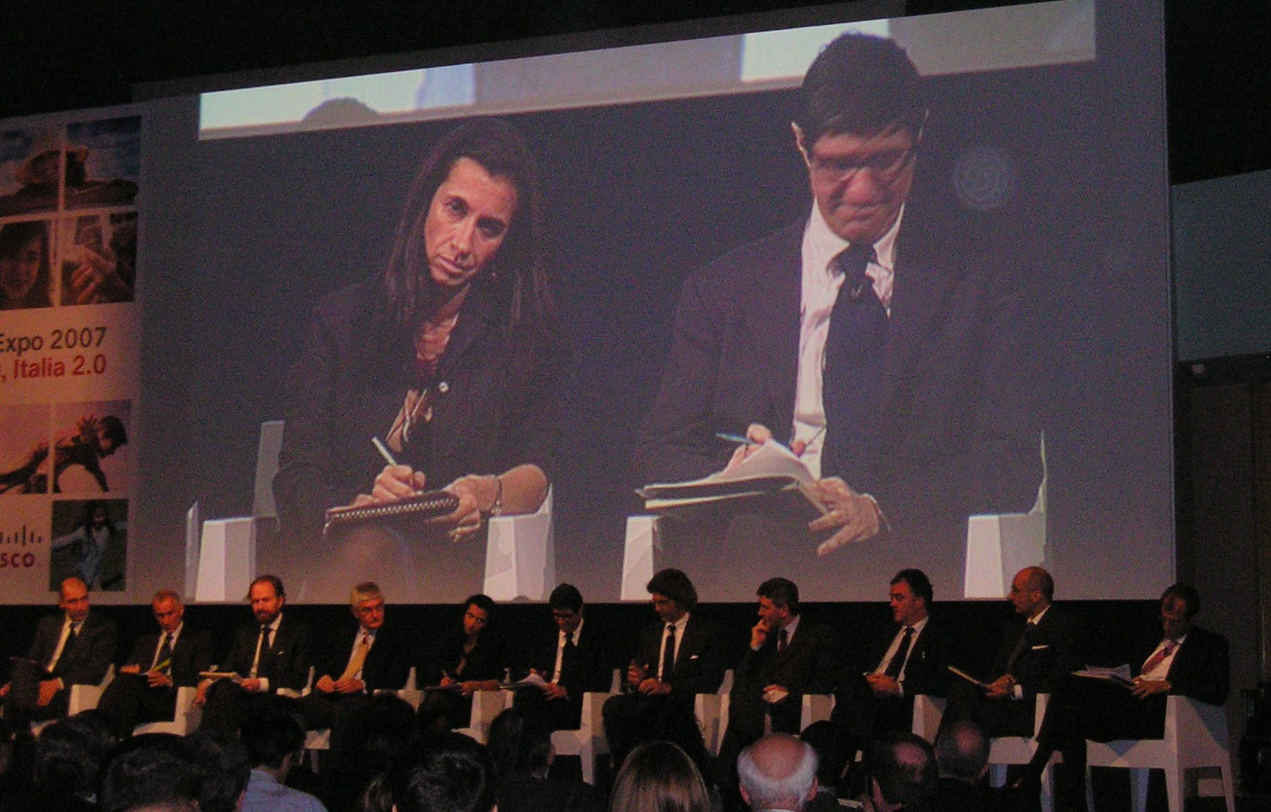 Il giornalista Gianni Riotta con l'imprenditrice Marina Salamon durante una conferenza